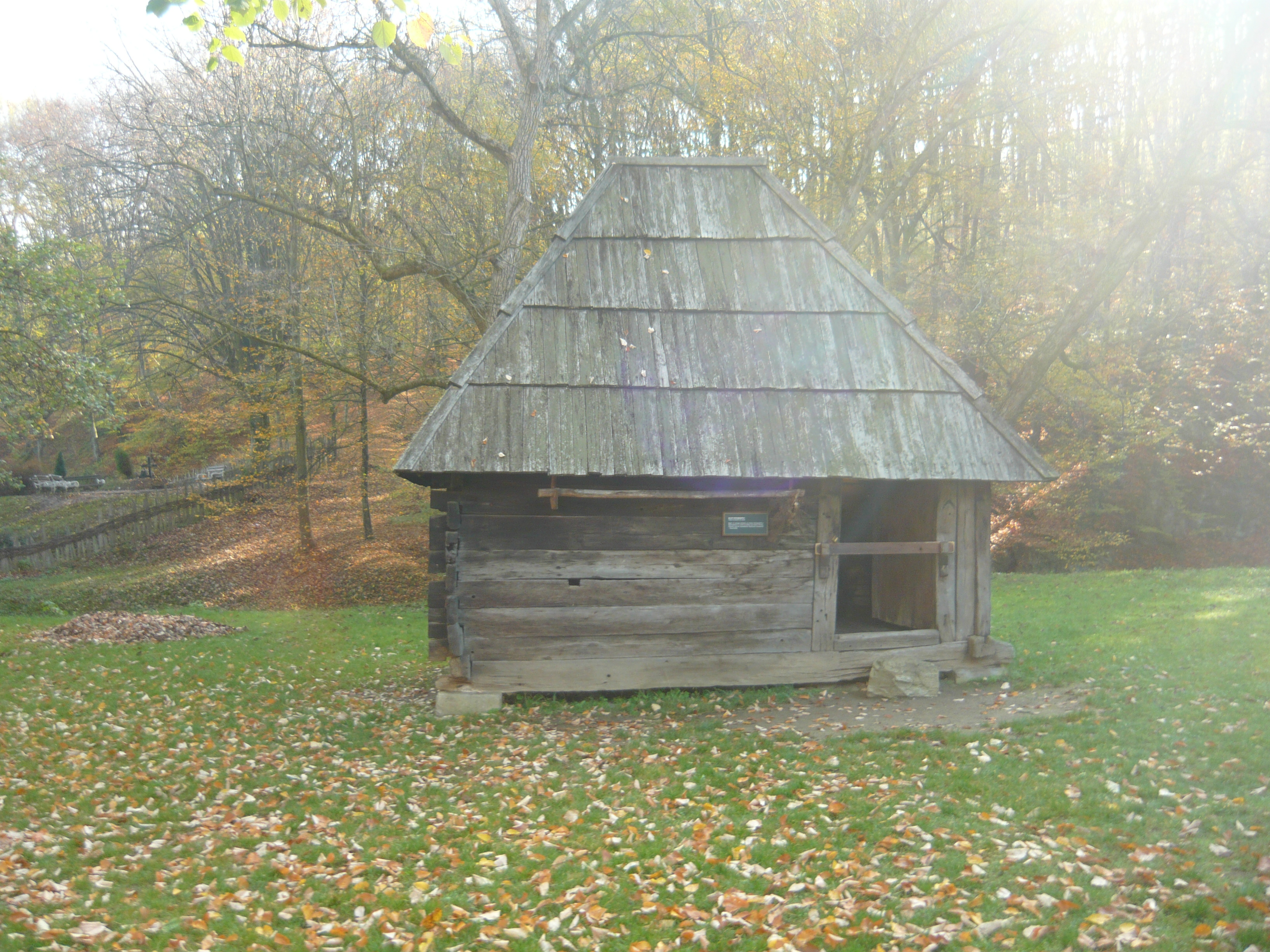 Обекат од дрвета